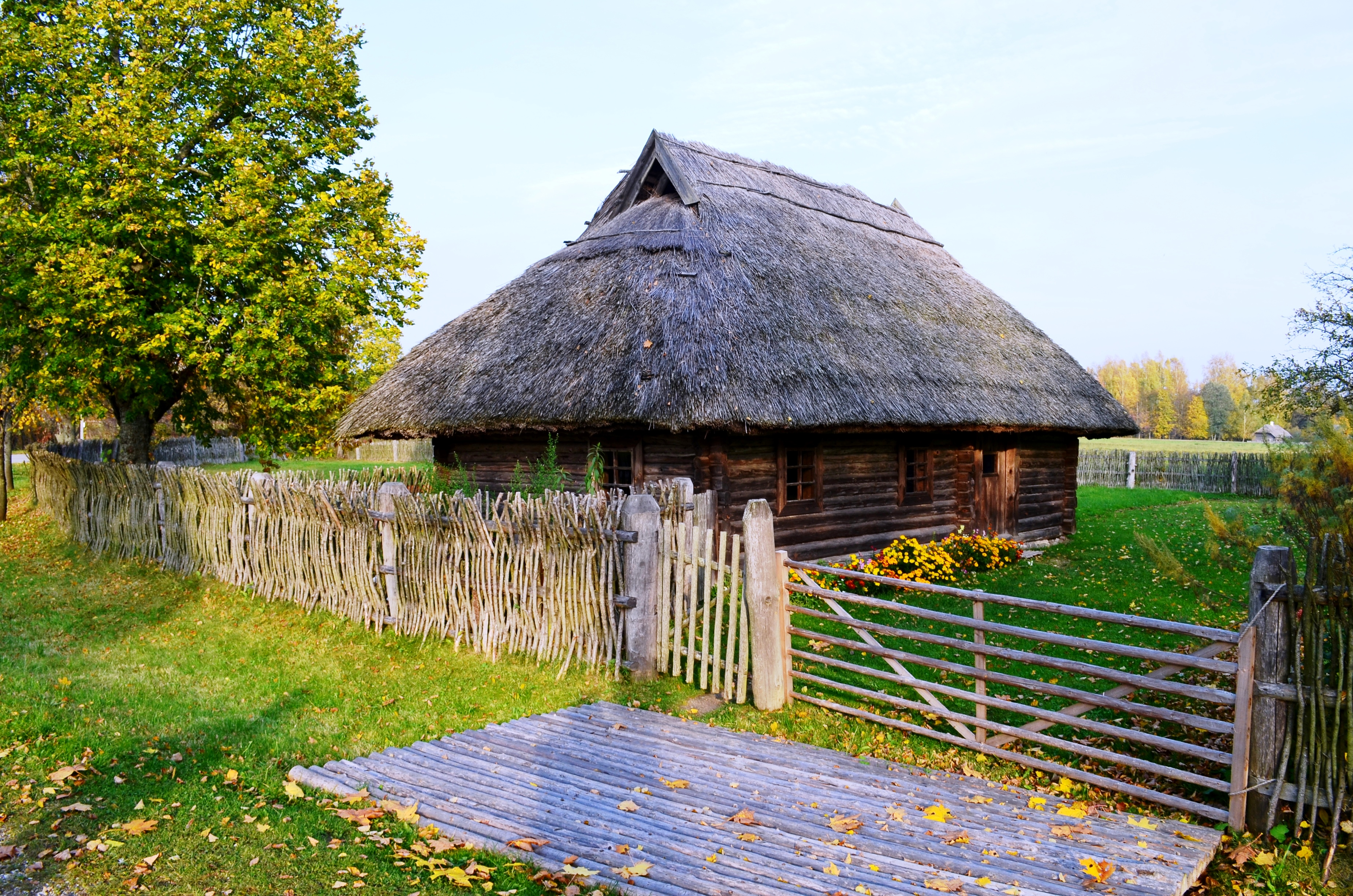 Aukštaičių gryčia iš Kilbisų, Rumšiškių muziejus